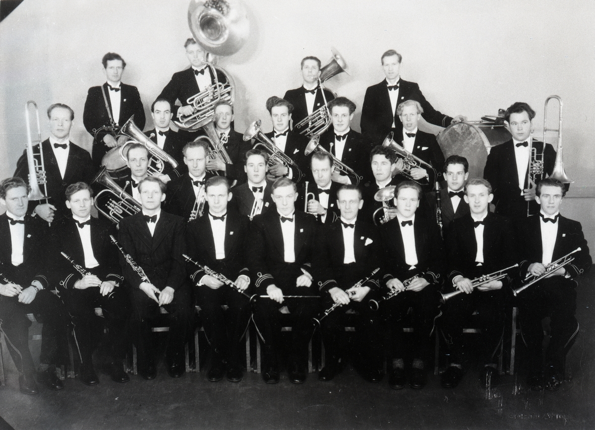 Sortland Musikkforening. Dirigent Åge Thomassen i midten foran.